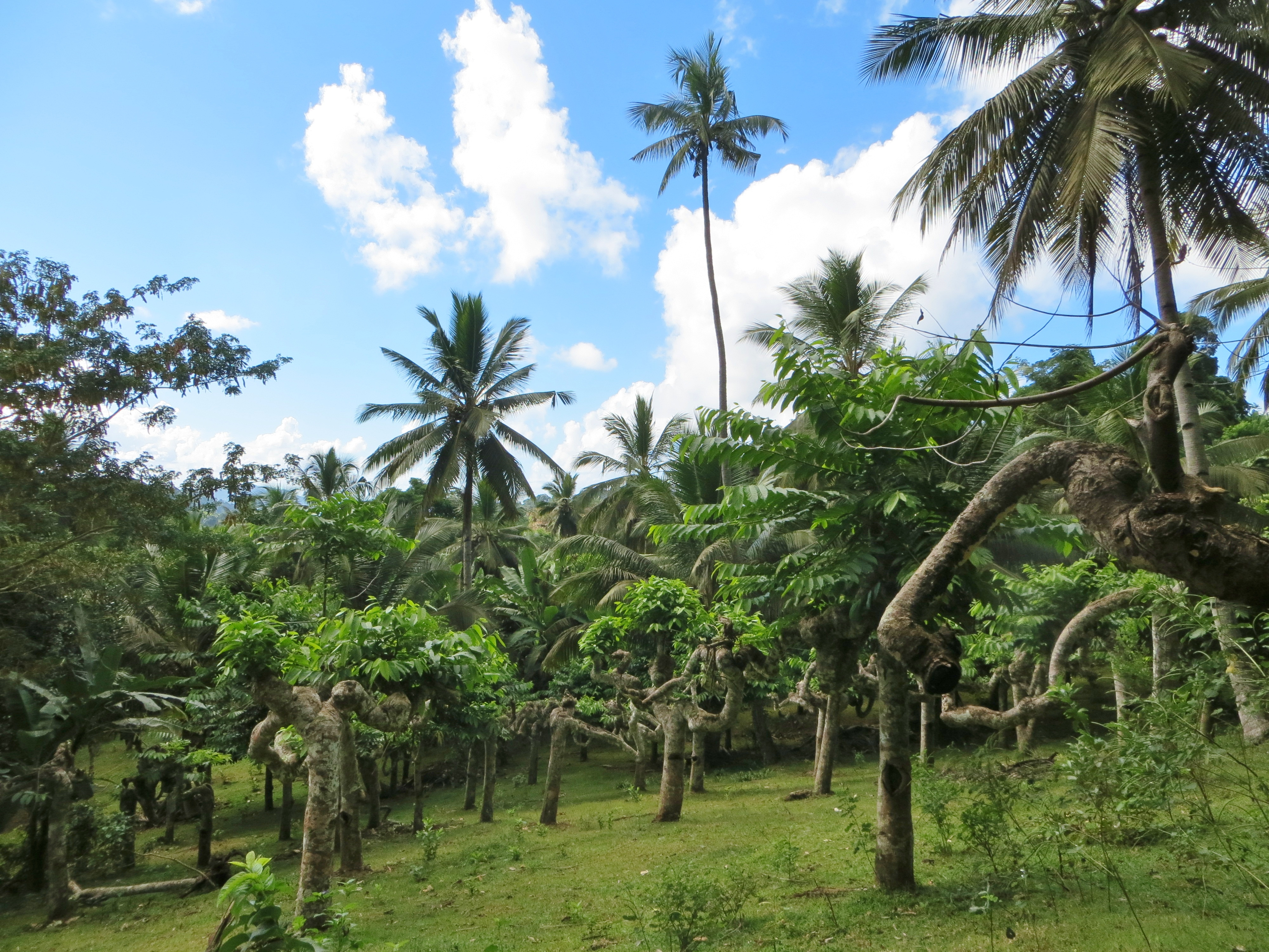 Champ d'ylang-ylang (Cananga odorata) en déshérence progressive à Mayotte, dans la région de Vahibé (près de Passamaïnty).